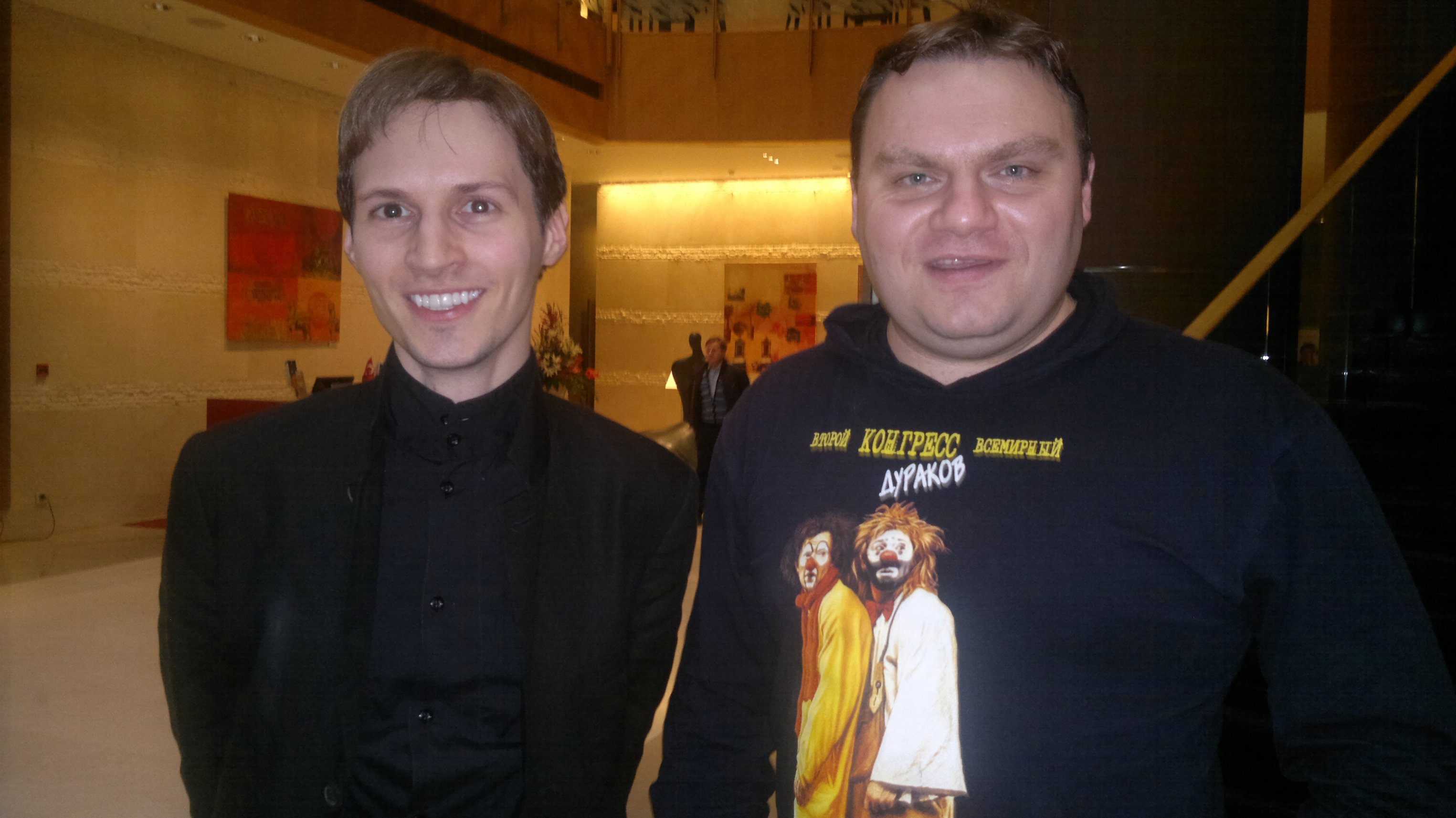 Основатель сайта "В контакте" Павел Дуров (слева) и Александр Плющев (справа)